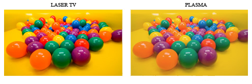 Comparativa entre LaserTV i PlasmaTV